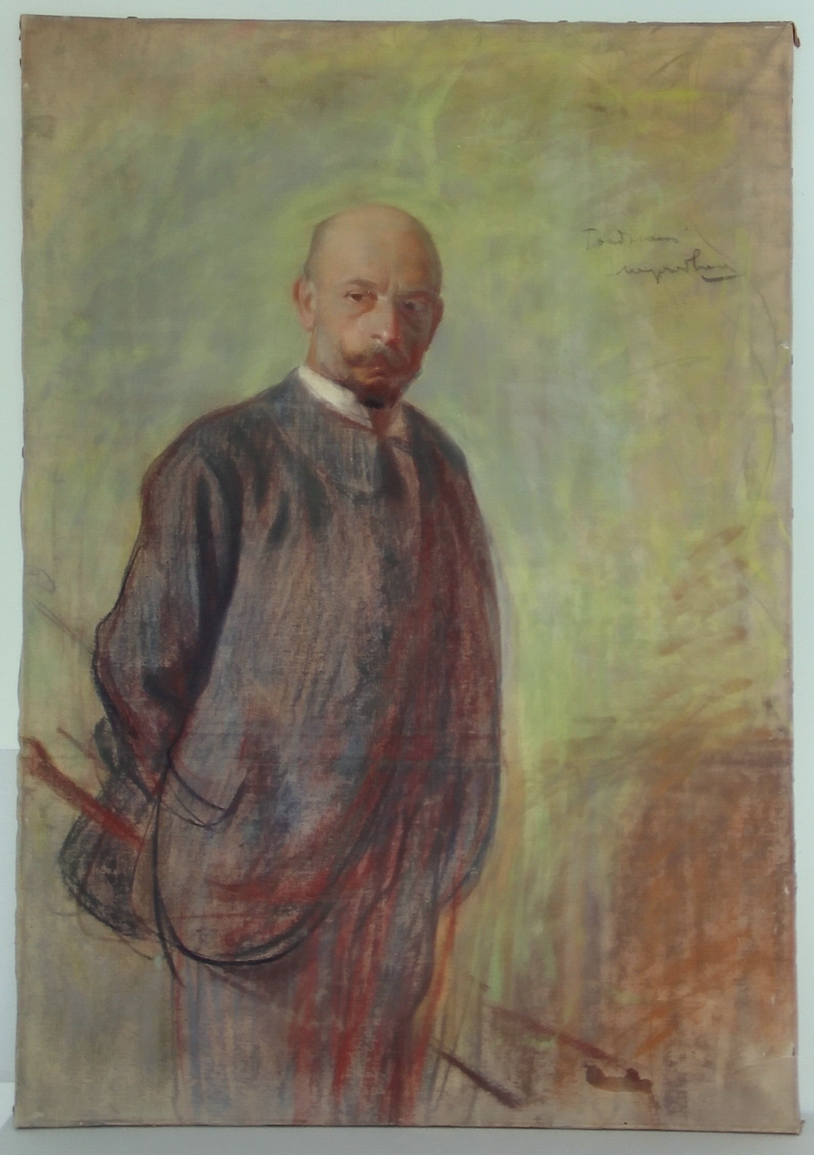 Leon Wyczółkowski, portret Stanisława Tondosa